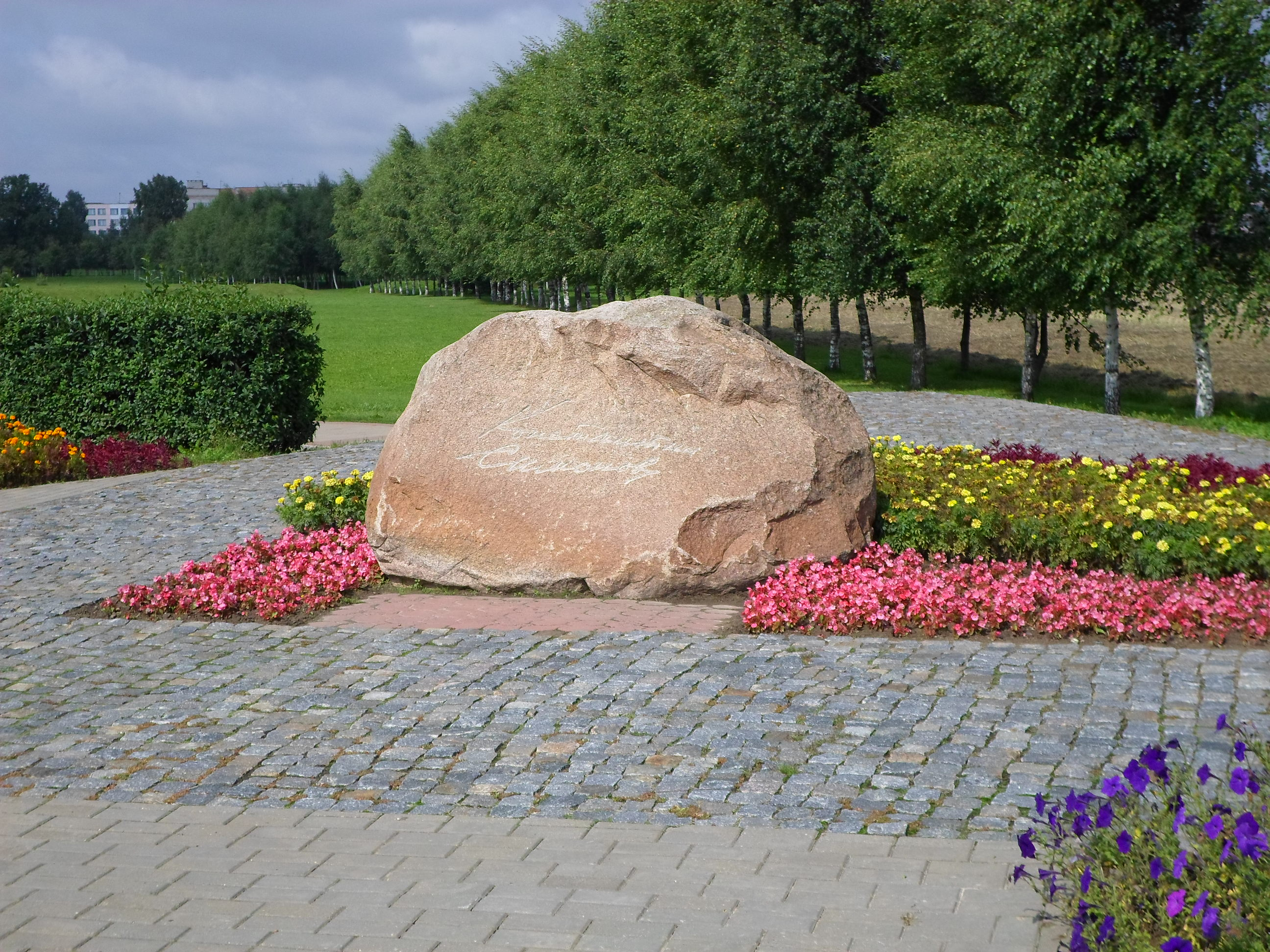 Мемориальный знак, посвященный памяти Константина Симонова, установленный на Буйничском поле, под Могилёвом.